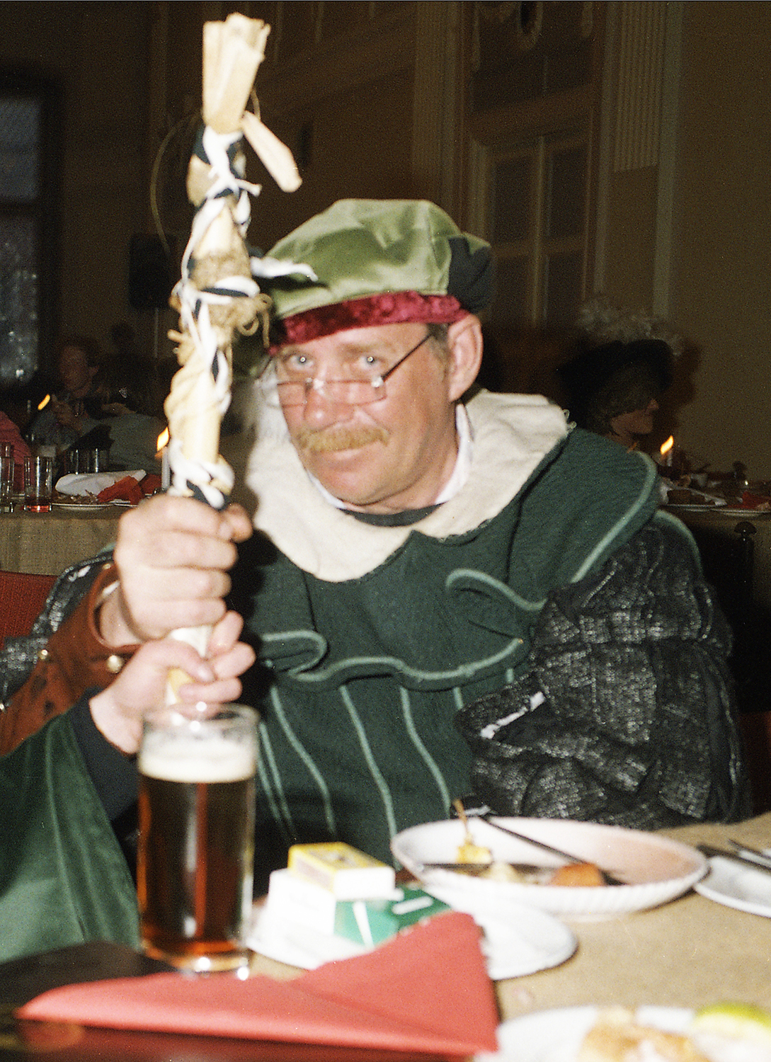 Lembit Sibul, näitleja vanalinnapäevadel 97